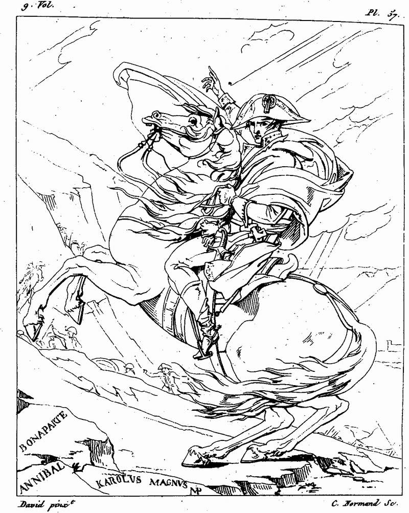 Planche 57 Portrait de S.M. Empereur et Roi;par M. David